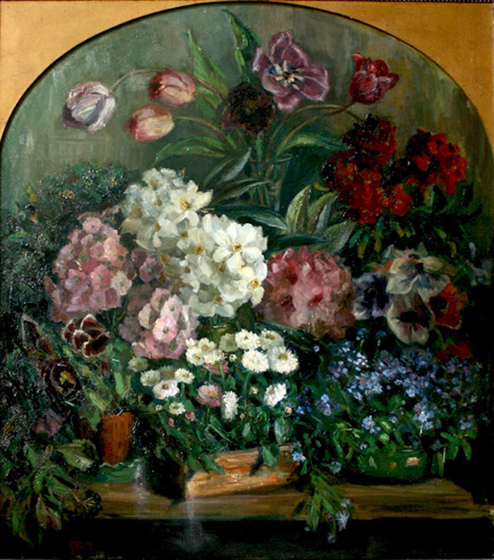 Dinah Kohnstamm - Bloemstilleven